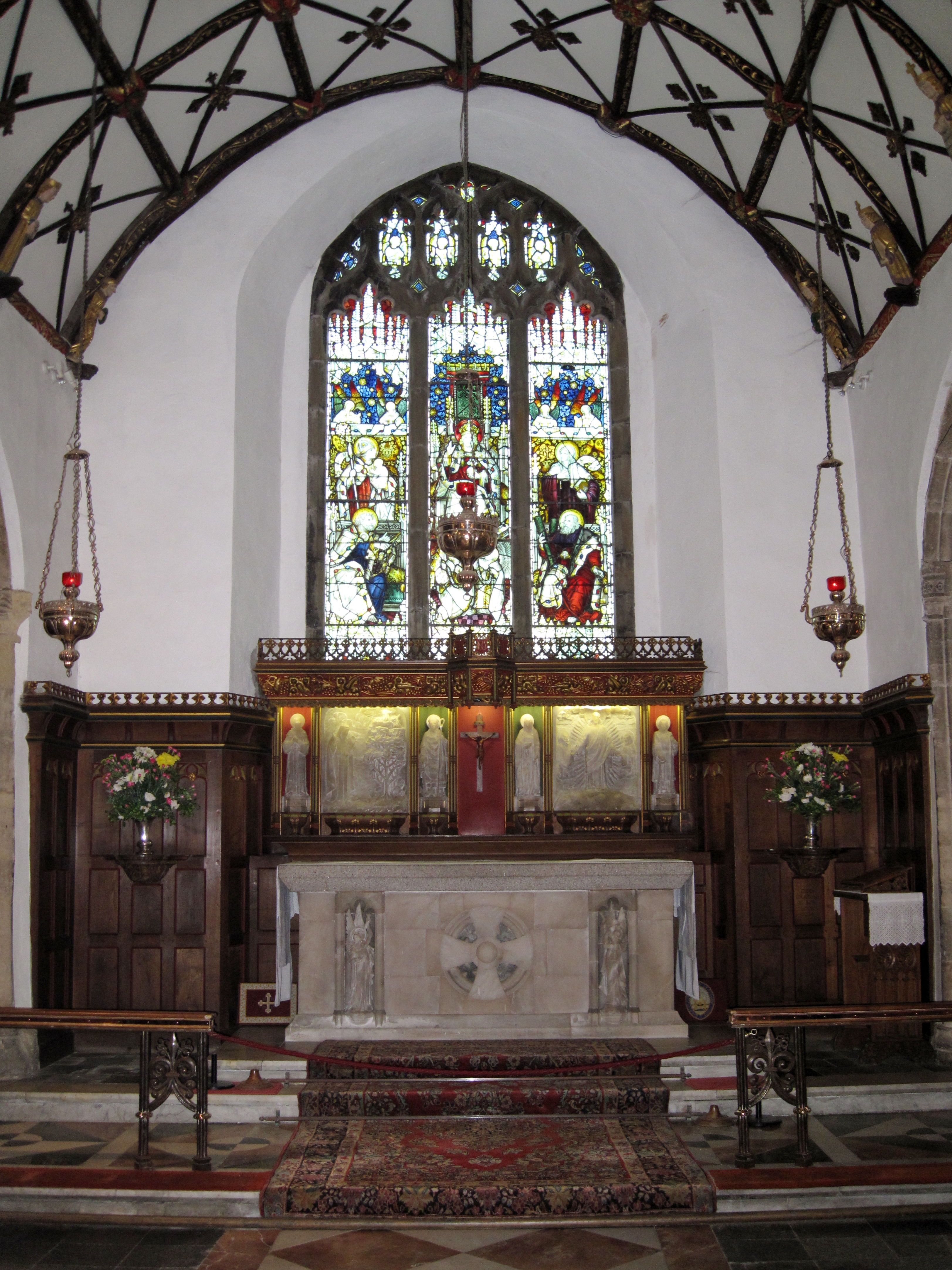 Innenraum der Gemeindekirche von St. Ives, Cornwall, England